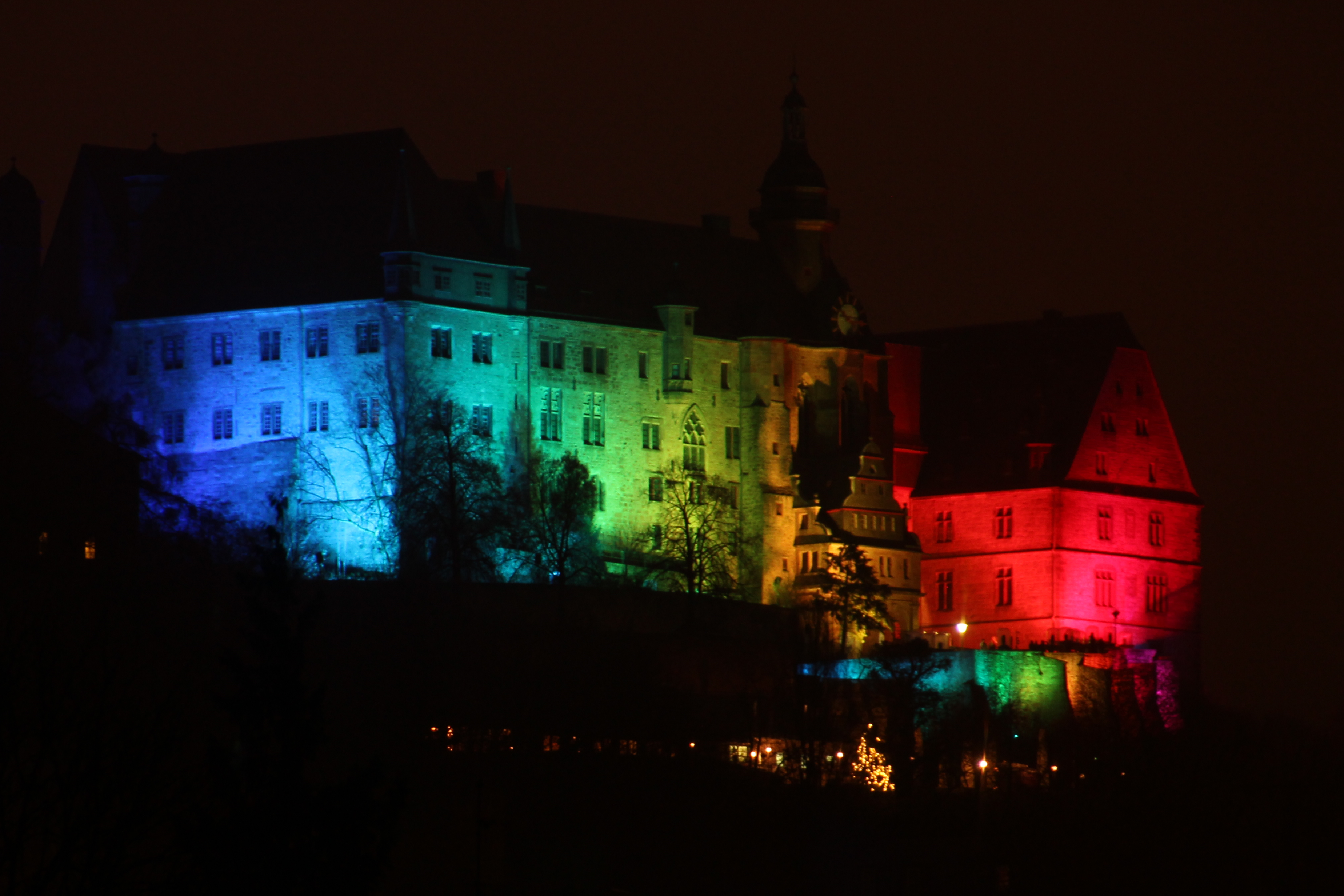 Marburg b(u)y Night 2015 - Schloss